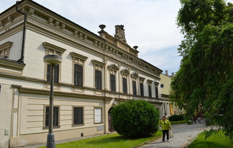 NOVÉ MĚSTO na Moravě - zámek